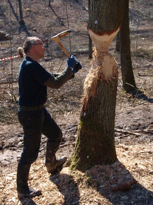 Zkušební kácení stromů s pravěkou sekerkou